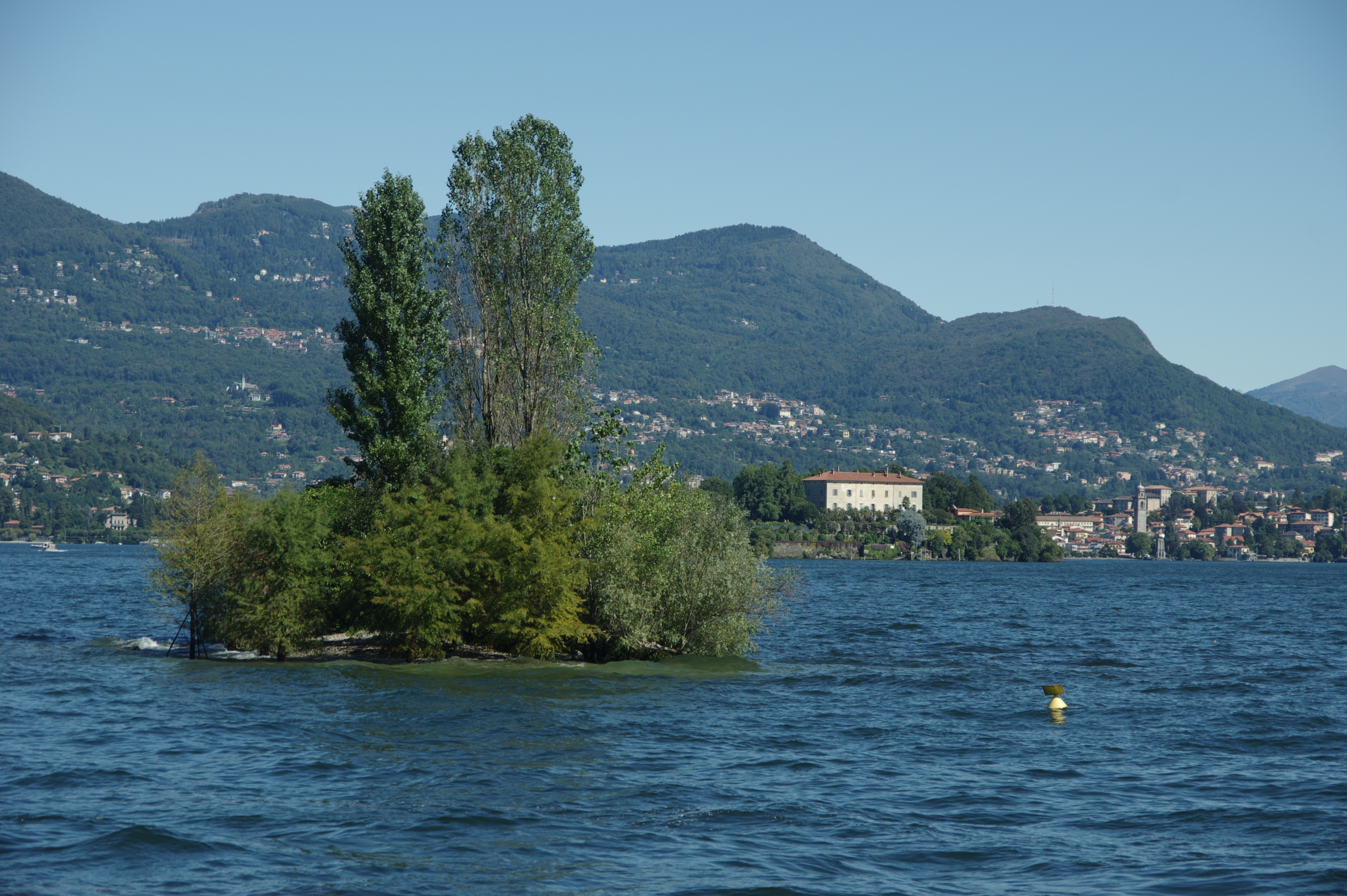 Scoglio della Malghera im Lago Maggiore in Italien. Die Insel befindet sich zwischen Isola Bella und der Isola Pescartore. Die Insel ist kleiner durch ein Hochwasser. Im Hindergrund die Isola Madre. Die Insel gehört zur Gemeinde Stresa.